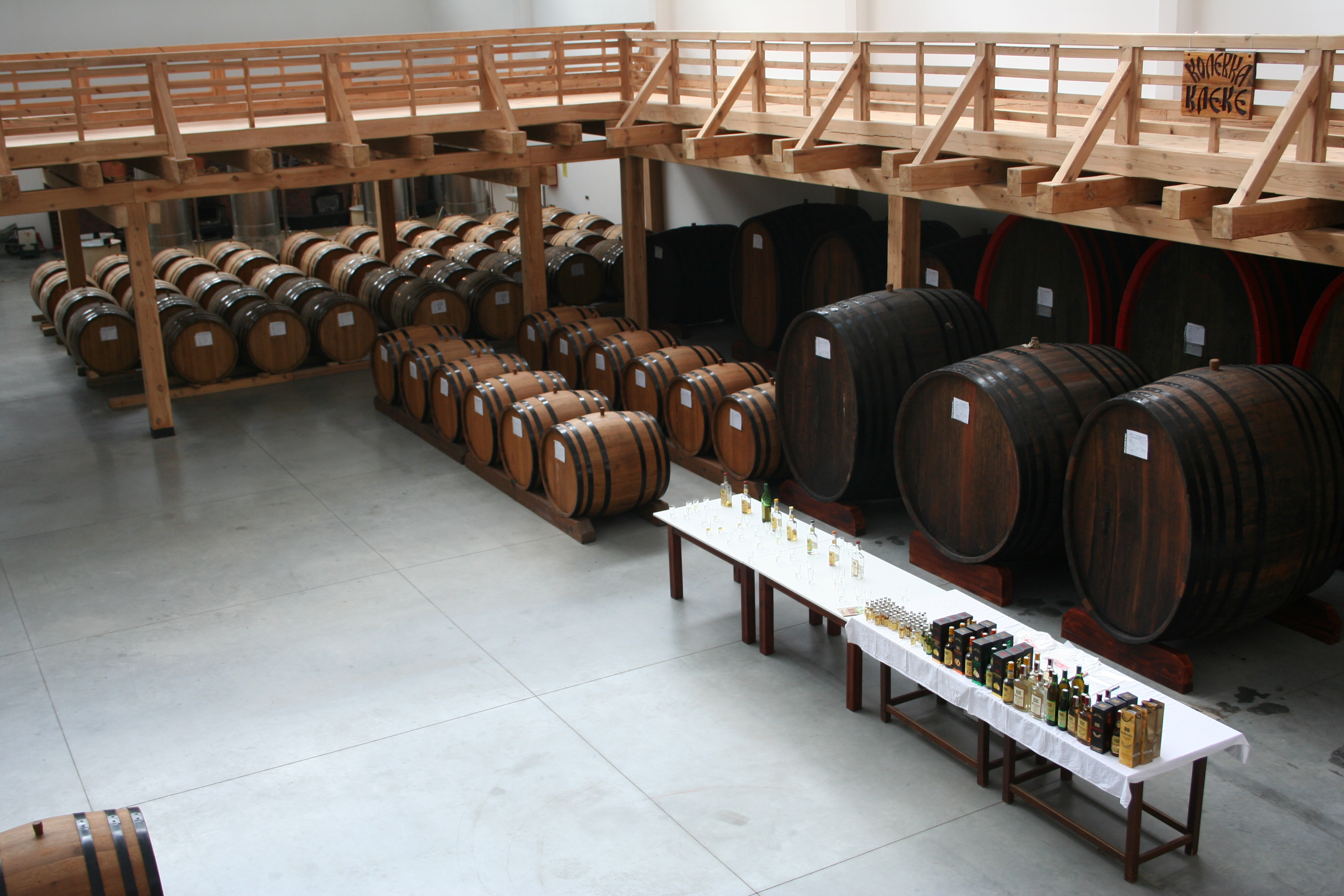 BB klekovača, Bajina Bašta